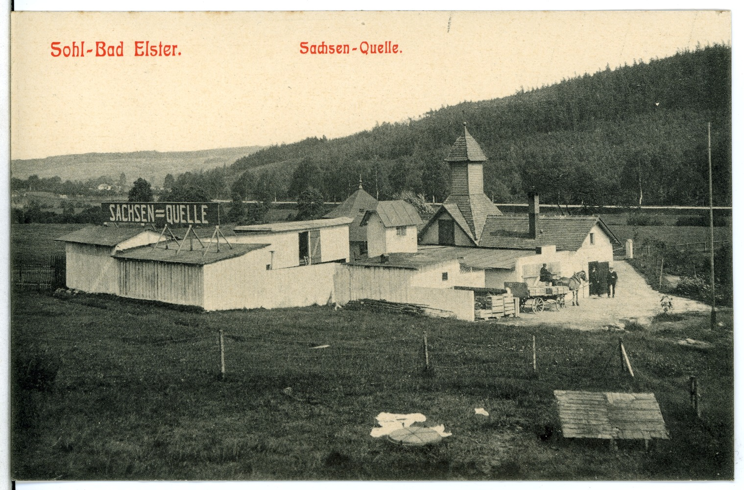 Bad Elster; Sohlbad - Sachsenquelle This postcard is from publisher Brück & Sohn in Meißen ( postcard has a unique number 11398 and is available in a higher resolution at the publisher. This images was uploaded in a cooperation project between Wikipedians and the publisher.